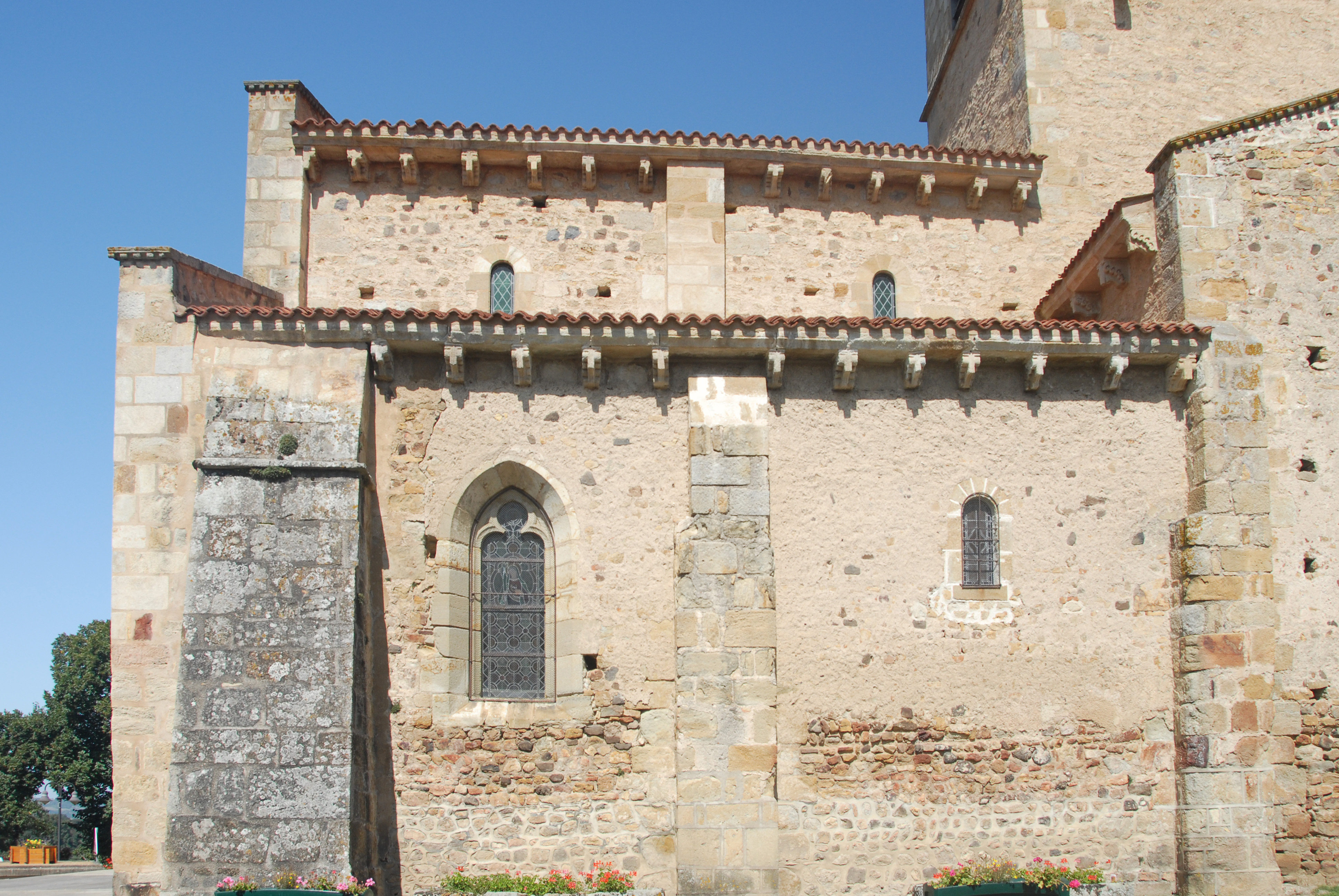 St.-Jean Glaine-Montaigut, Langhaus von S